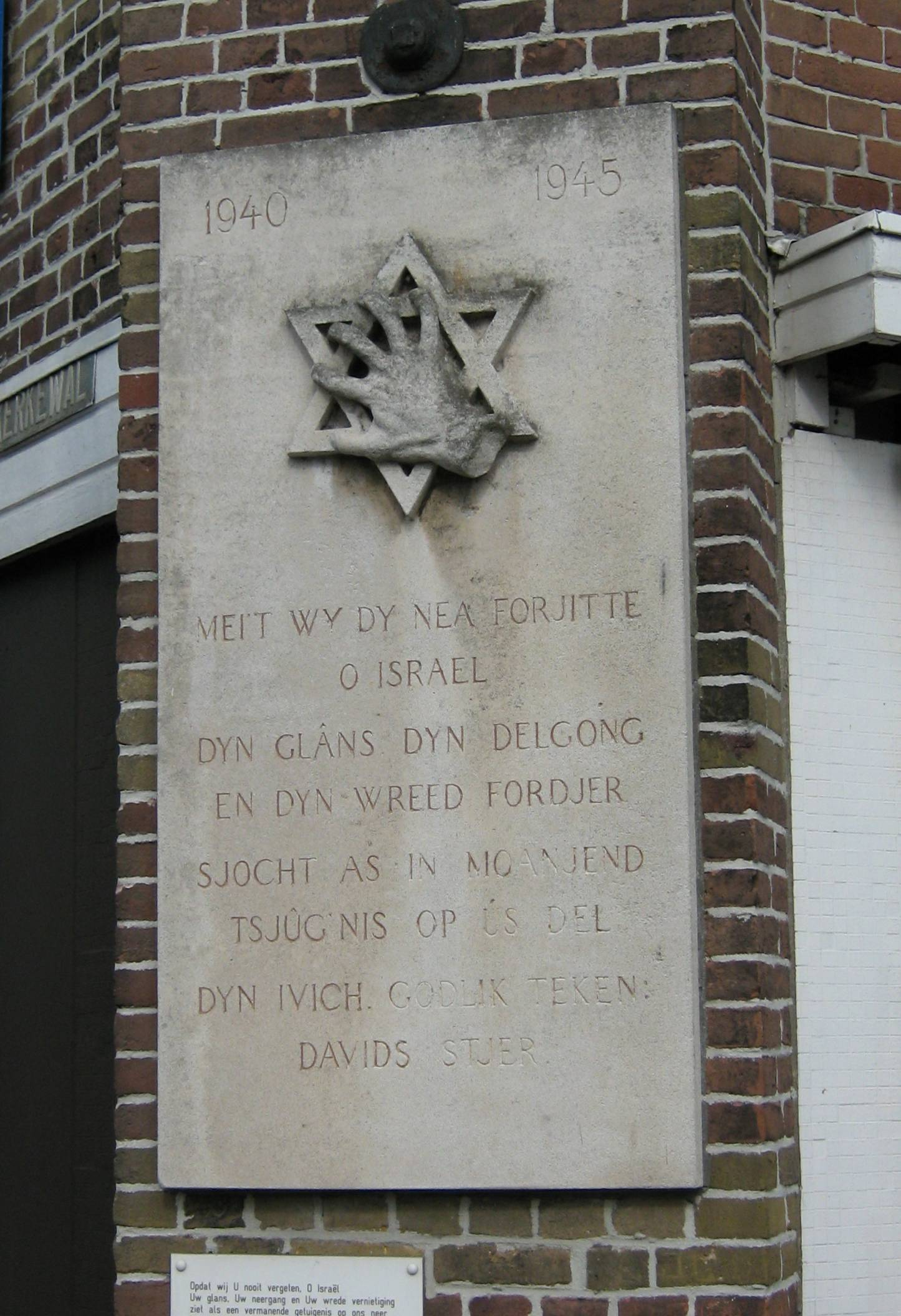 Johan G. Wertheim, 1946